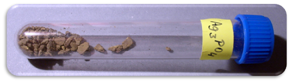 Fosforečnan stříbrný - Ag3PO4